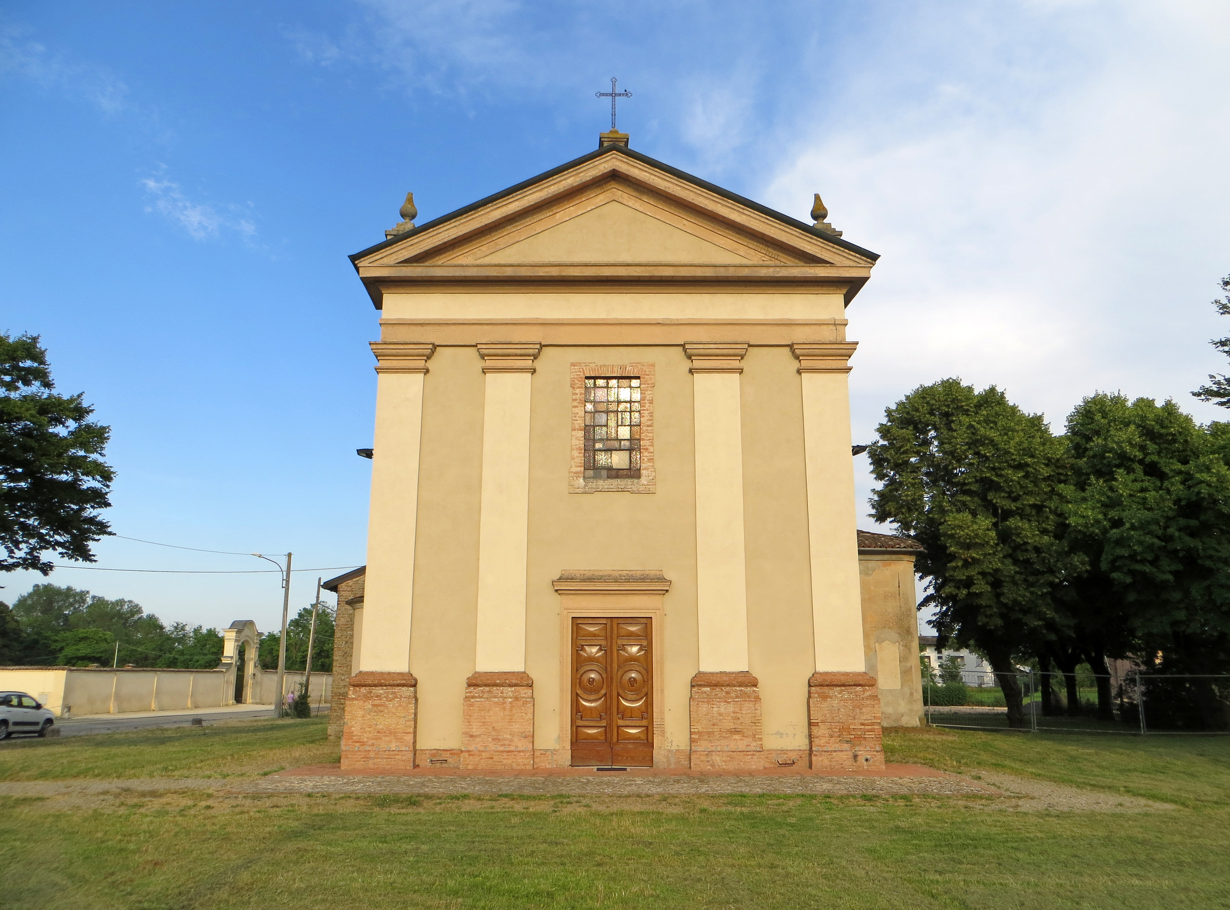 Chiesa di San Pietro (Castellina, Soragna) - facciata